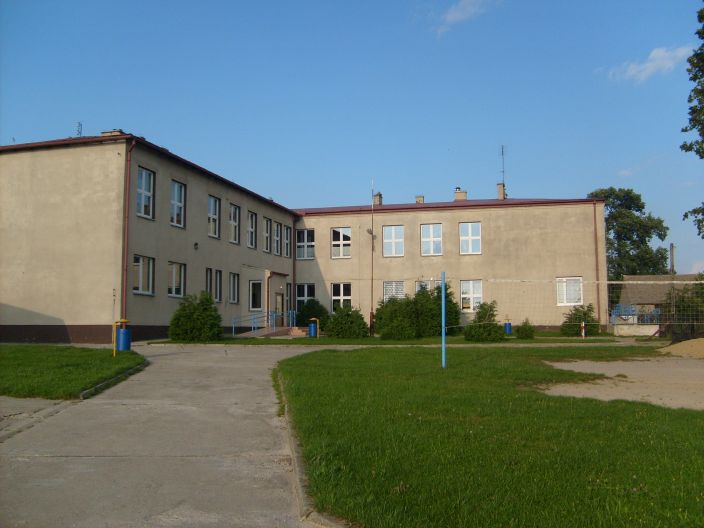 Publiczna Szkoła Podstawowa w Ożarowie.